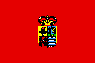 Bandera del concejo asturiano de Salas